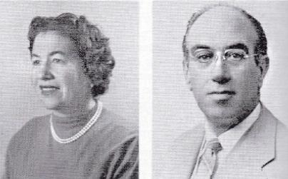 מאריו ולינה סאנטריני ה"דודים" של דניאל קאסוטו. (מתוך: "לדור אשר לא ידע")